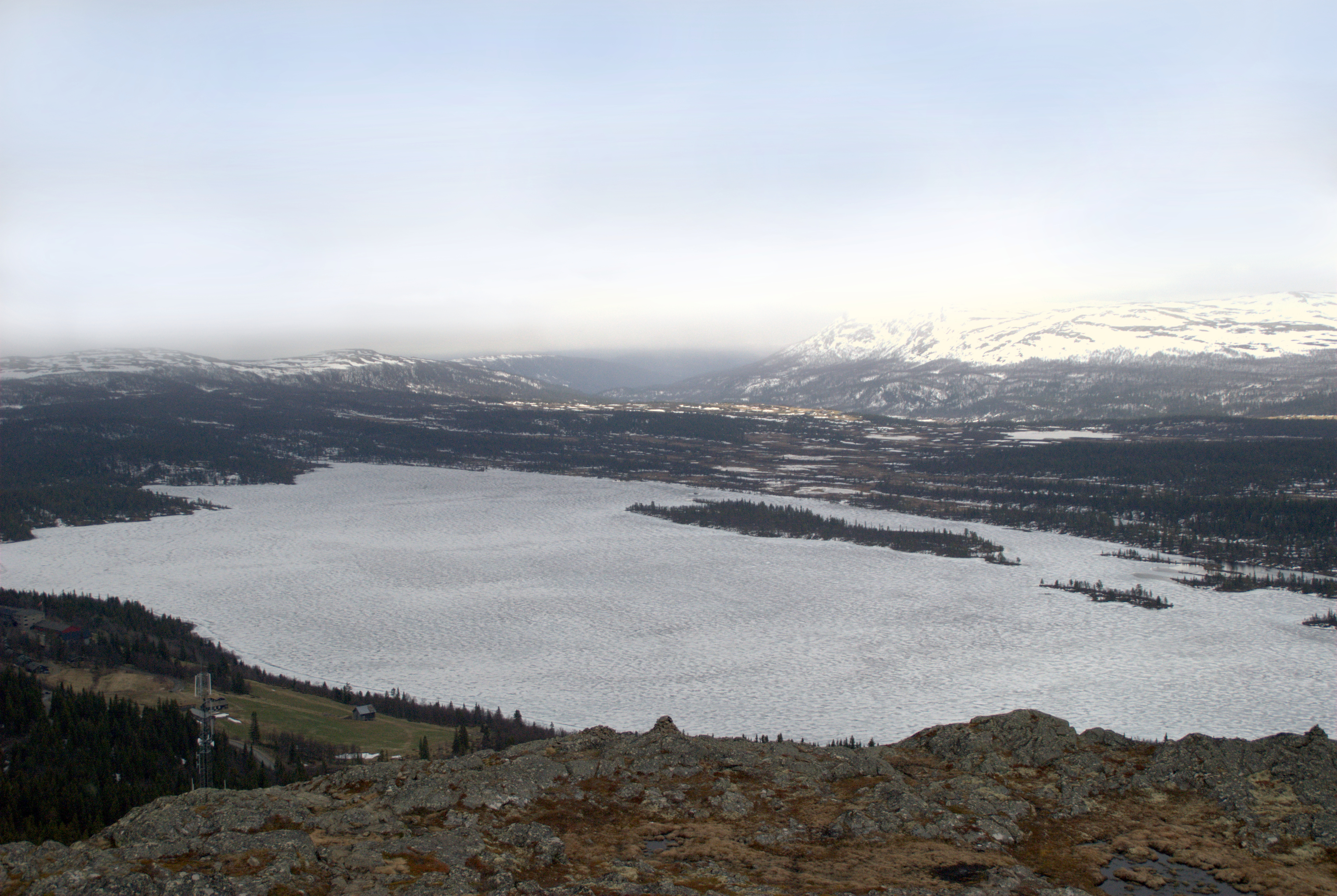 Feforvatnet i Nord-Fron kommune i Oppland, sett mot sørlig retning fra Feforkampen.